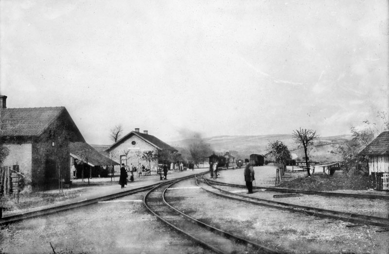 A vajdahunyadi felső-pályaudvar (az erdélyi bányavasút kis állomása), Vajdahunyad, Románia